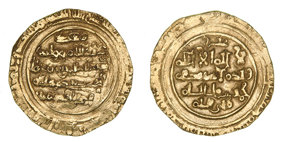 سکه نایاب بسیاسیری در شام. به نام خلیفه مصر